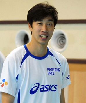 대한민국의 배구인 김세진